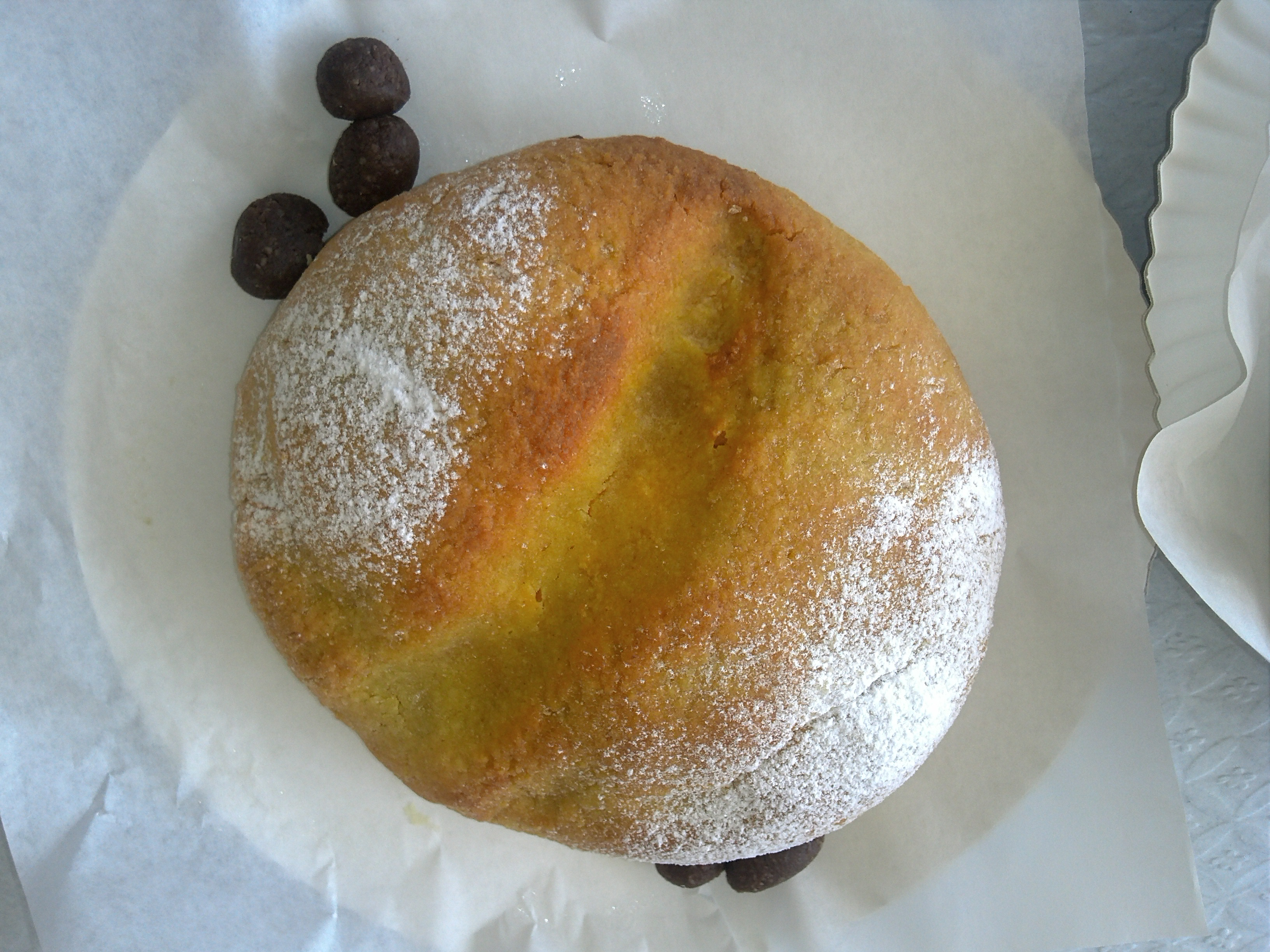 Pão de Rala, tal como é vendido, acompanhado com "azeitonas" de massapão e cacau.